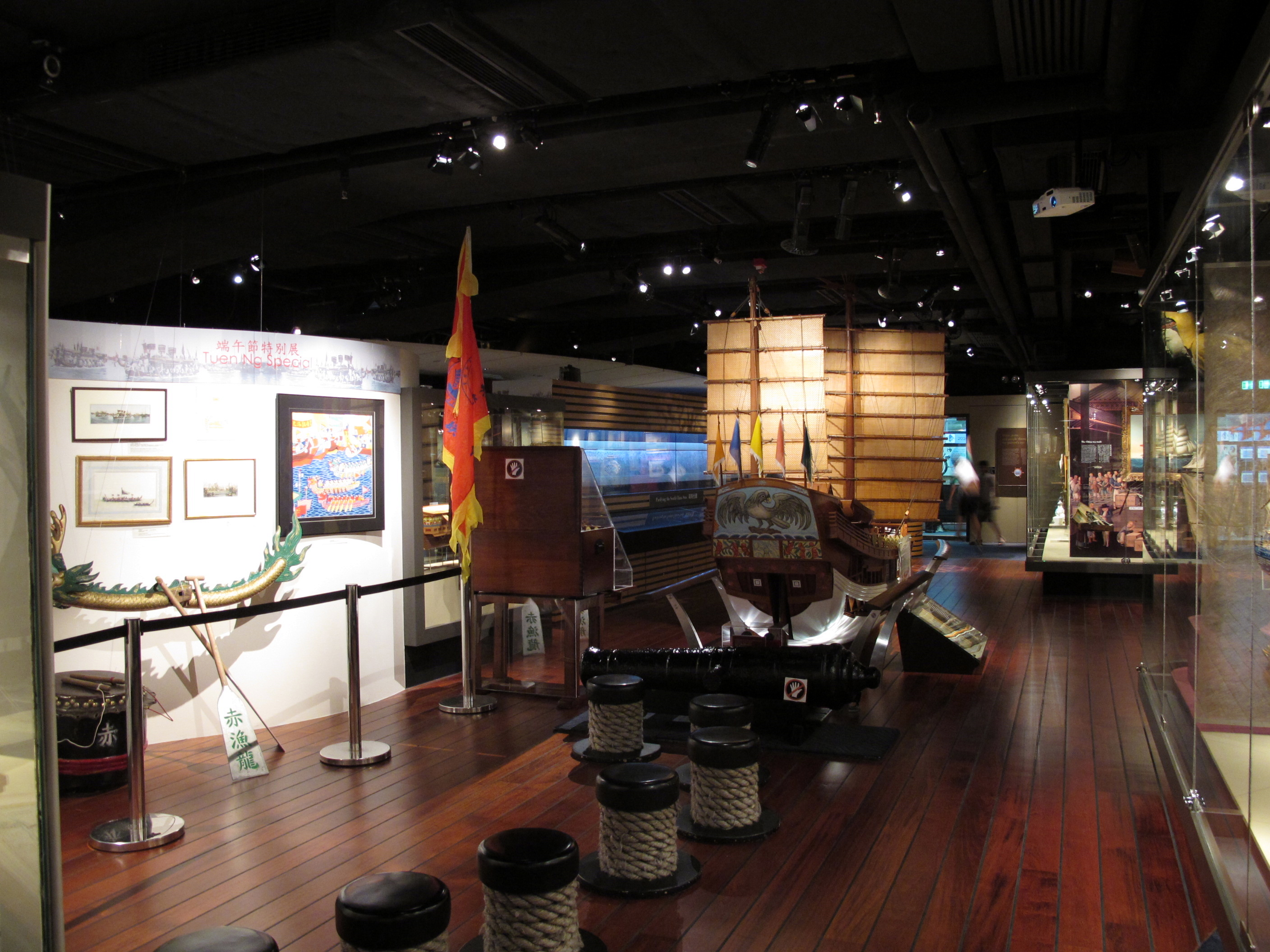 Hong Kong Maritime Museum 香港海事博物館